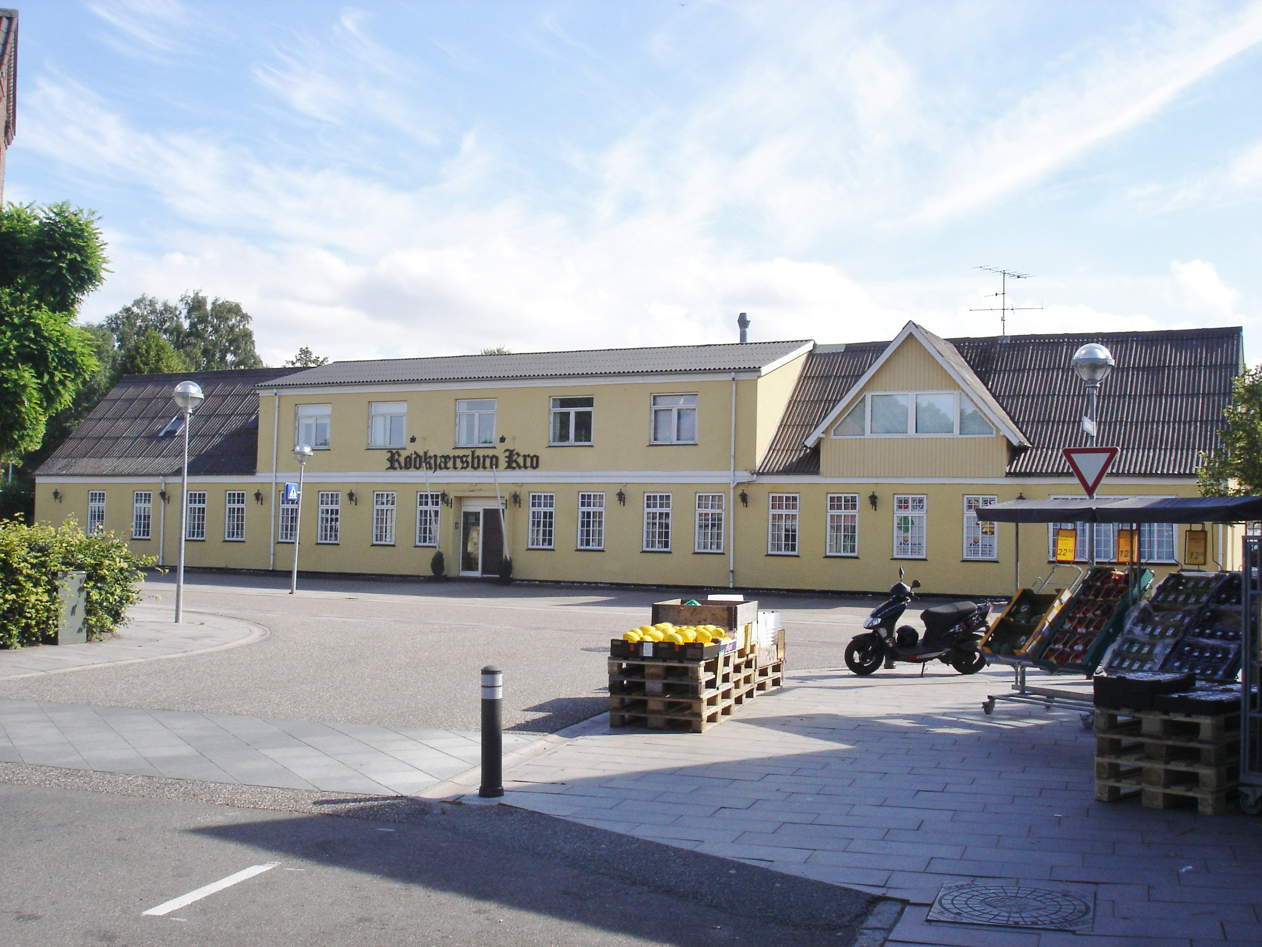 Rødkjærsbro Kro fra V